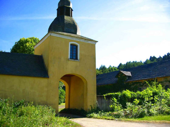 Portal des Guts Listringhausen in Meinerzhagen